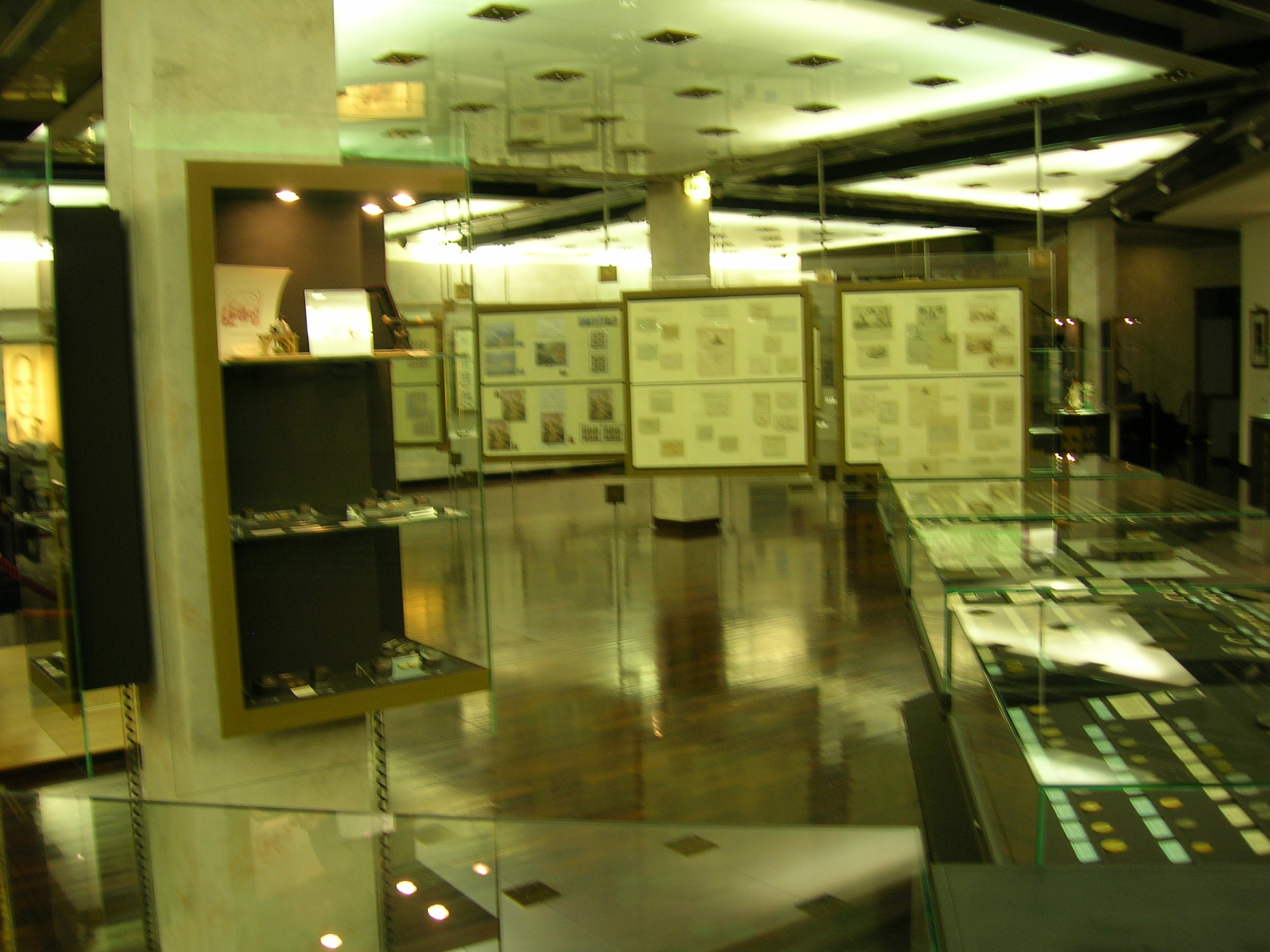 Музей марок и монет Монако